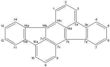 使用CS ChemDrawm制作